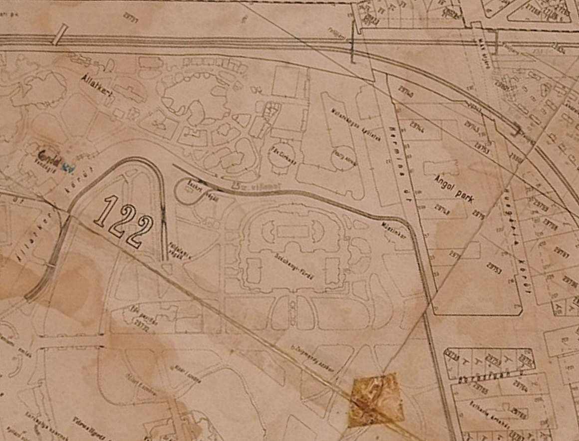 A Városliget kis részlete 1937-es felmérés alapján (Budapest)